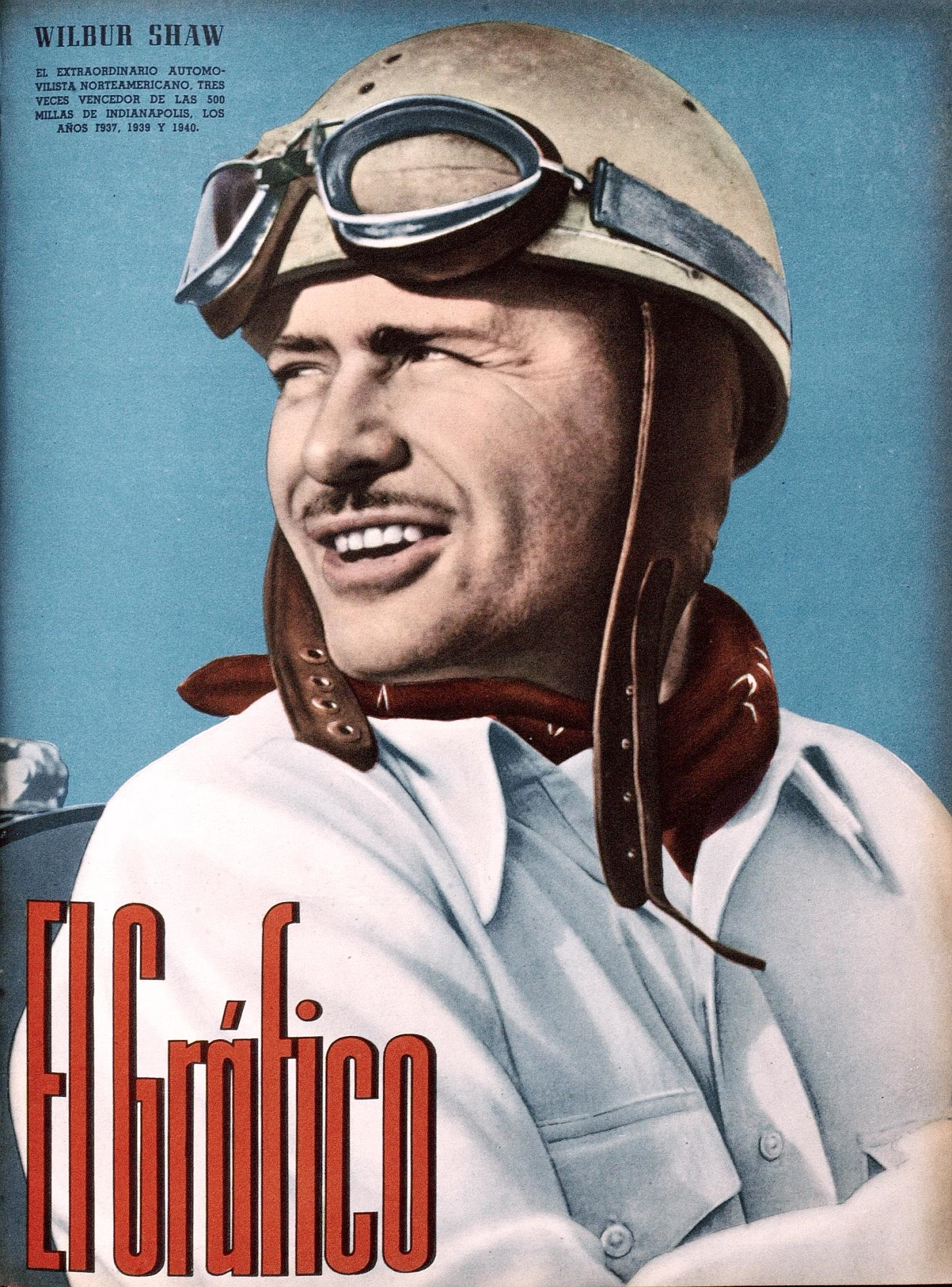 El Grafico del 14 de Junio de 1940. Edicion 1092